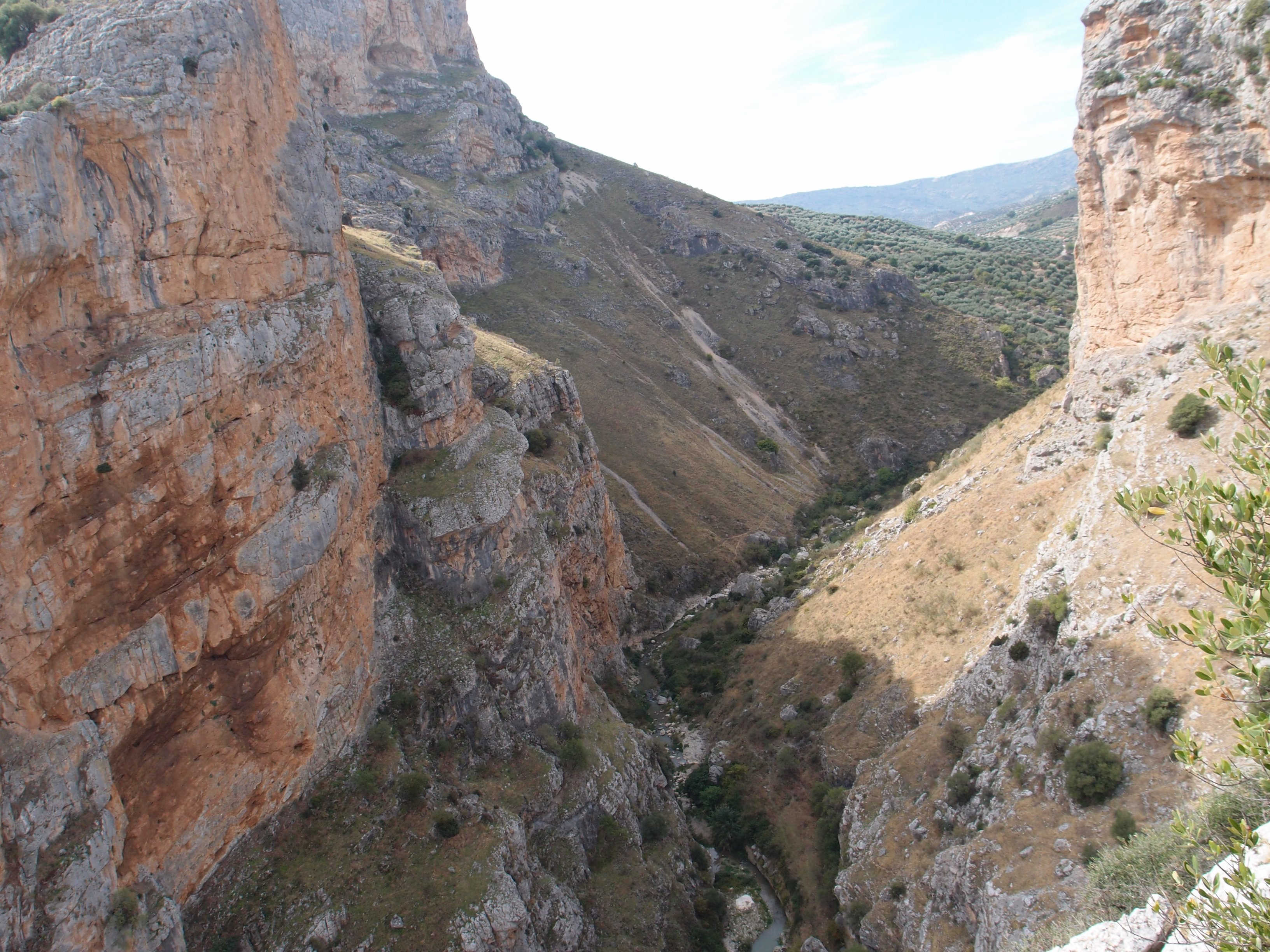 Los cañones de río Frío, a la altura del Mingo.